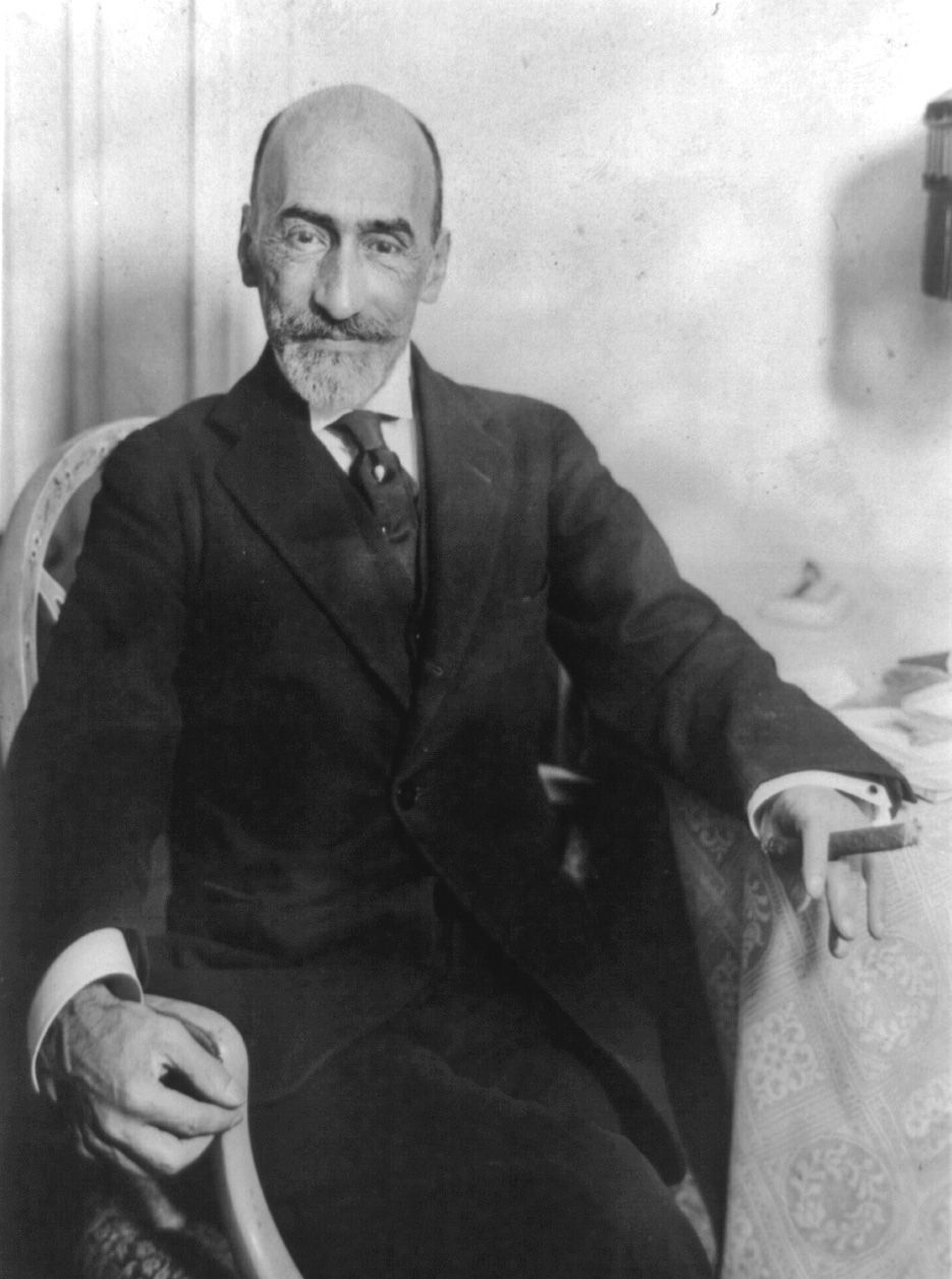 Jacinto Benavente y Martínez (1866 – 1954), spanish writer.